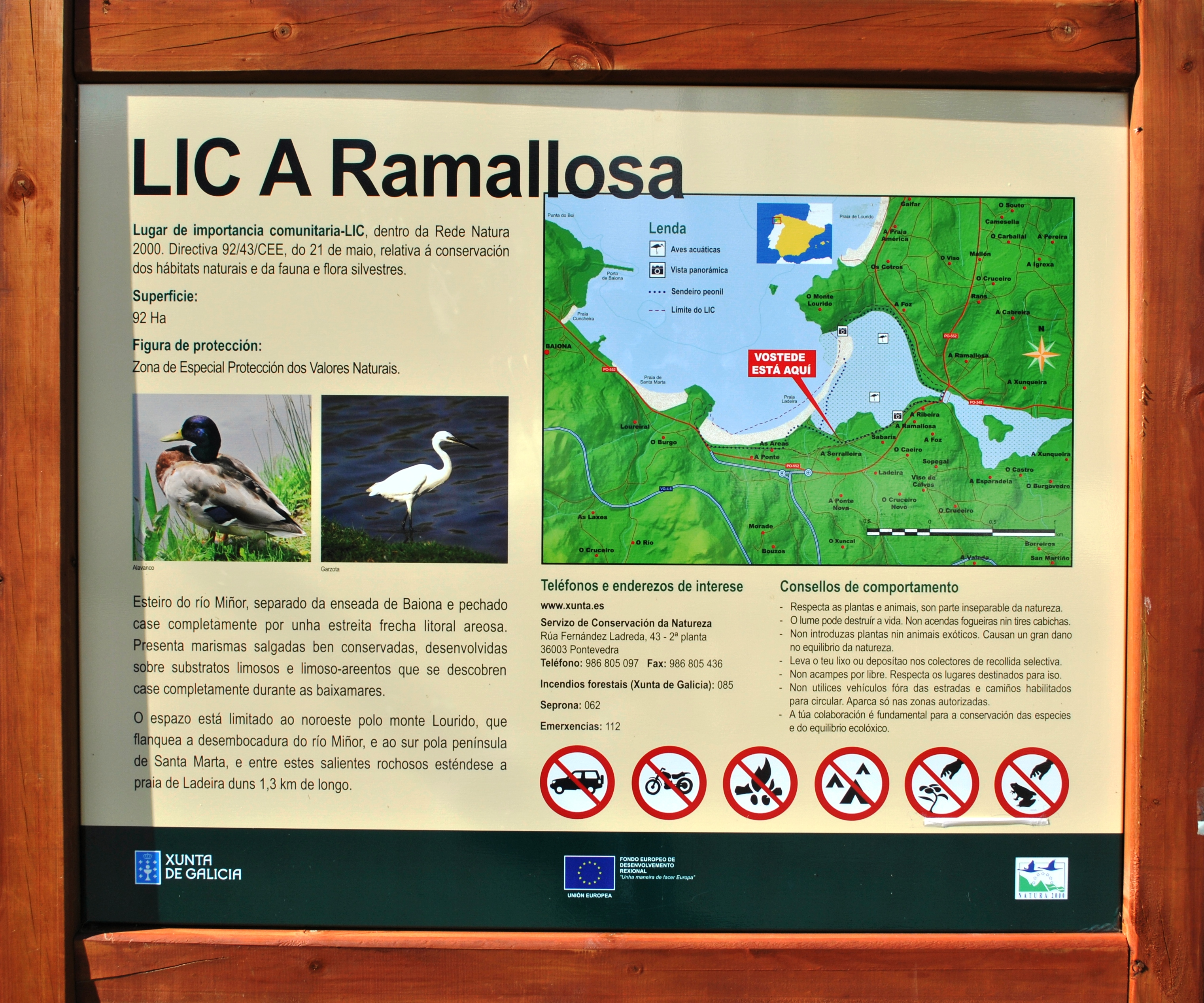 Véxase o título e as categorías.